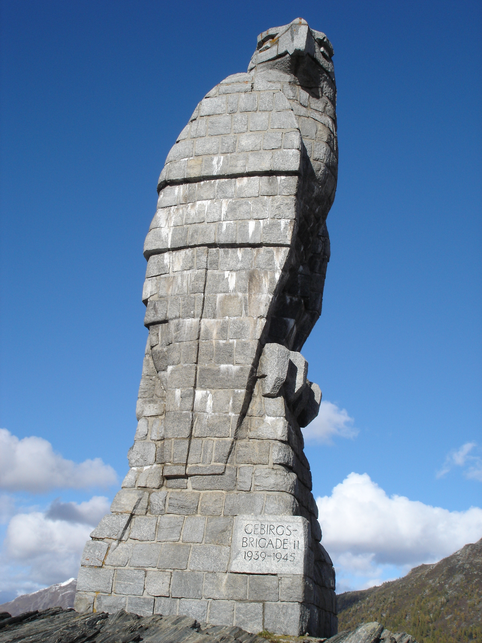 Steinadler auf dem Simplon. Er wurde während des zweiten Weltkriegs von Erwin Friedrich Baumann entworfen und durch Soldaten der Schweizer Armee als Bruchsteinmauerwerk errichtet. Der Adler blickt Richtung Süden/Italien. Inschrift auf dem Sockel des Denkmals: «IN DER FREIHEIT DER BERGE STEHT ES, EIN WUCHTIGES MAL AUS HARTEM GRANIT: EIN GEDENKEN TREUER PFLICHTERFÜLLUNG, EIN DAUERNDES MAHNEN, WILLIG UND WACH ZU SEIN FÜR UNSERE FREIHEIT.»